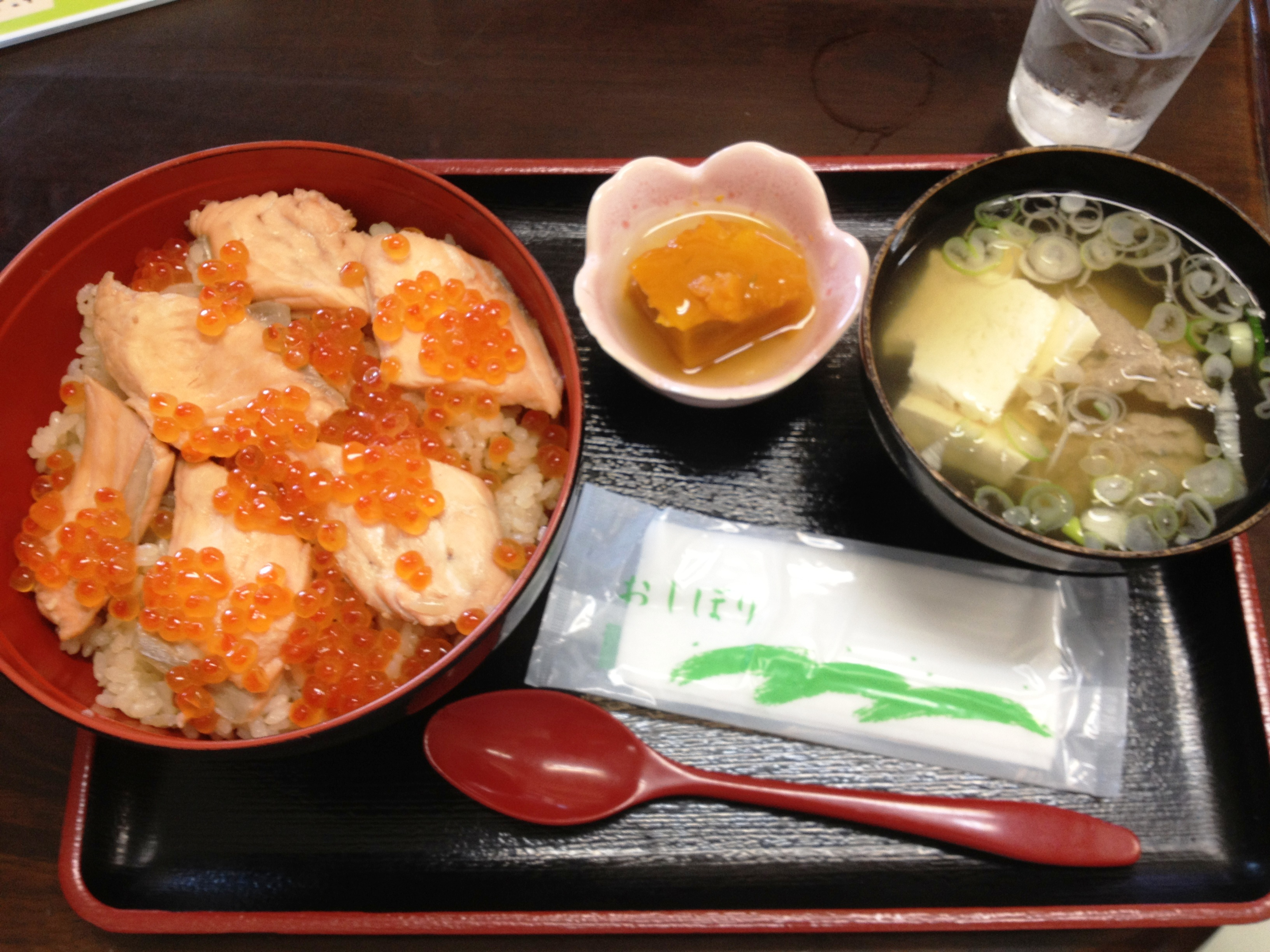 宮城県亘理町で一般的に食されるはらこ飯とお吸い物